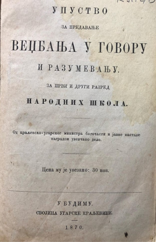 Српски (ћирилица): „Упутство за предавање Веџбања у говору и разумевању” (1870), уџбеник о беседништву за децу за први и други разред Народних школа. Налази се у Удружењу за културу, уметности и међународну сарадњу „Адлигат” у Београду.